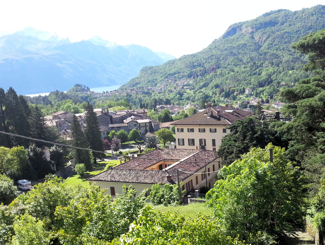 Villa Camozzi sullo sfondo dell'abitato di Codogna